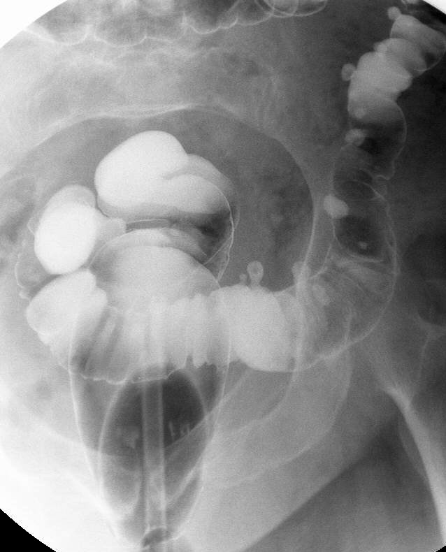 Darstellung des Rektums, des Colon sigmoideums und des Colon descendens im Doppelkontrast bei einem Röntgen Kontrasteinlauf. Im distalen Colon descendens und im Sigma lassen sich einzelne kleine Ausstülpungen erkennen, die als Divertikel bezeichnet werden.